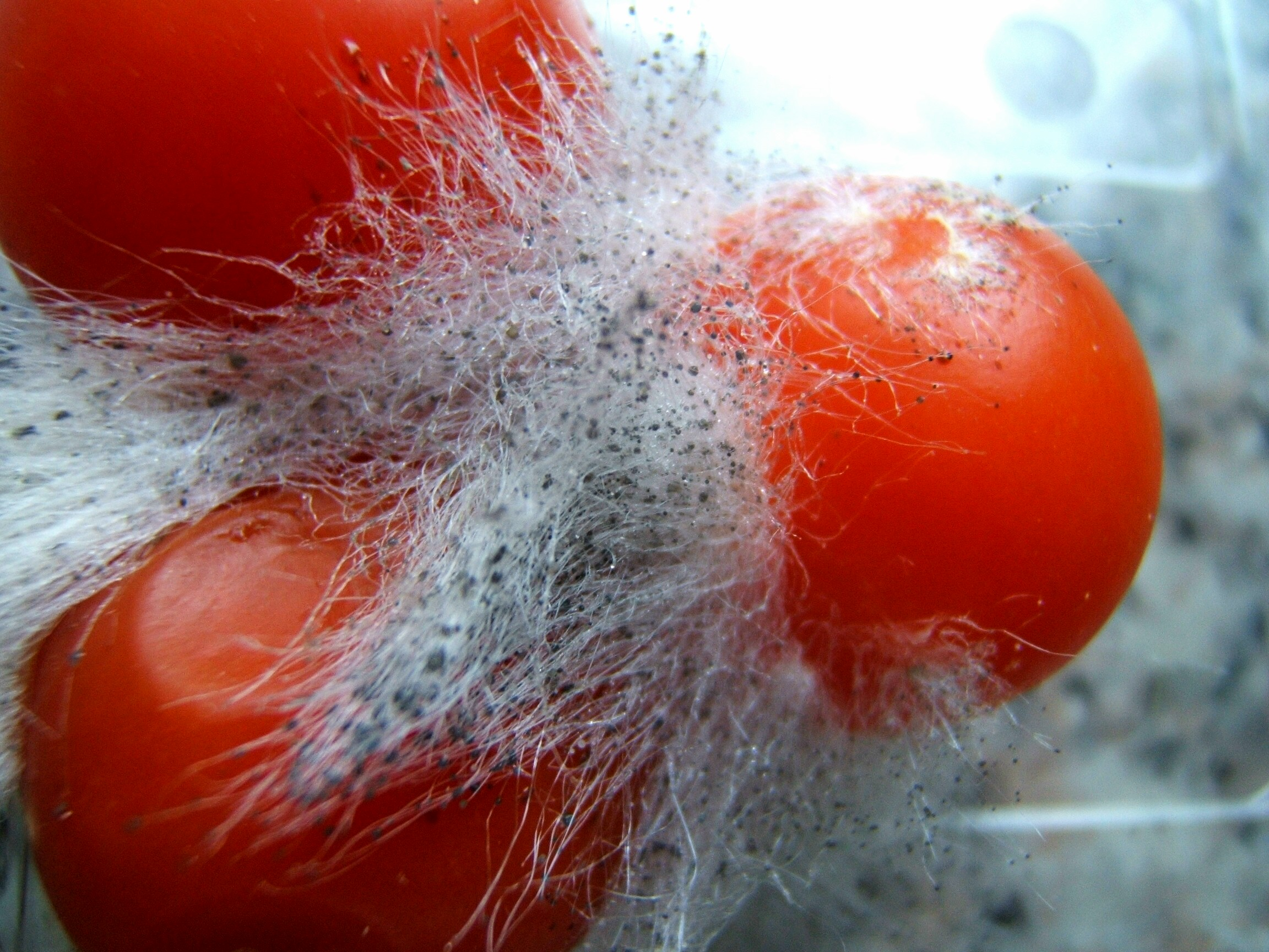 schimmel op tomaten